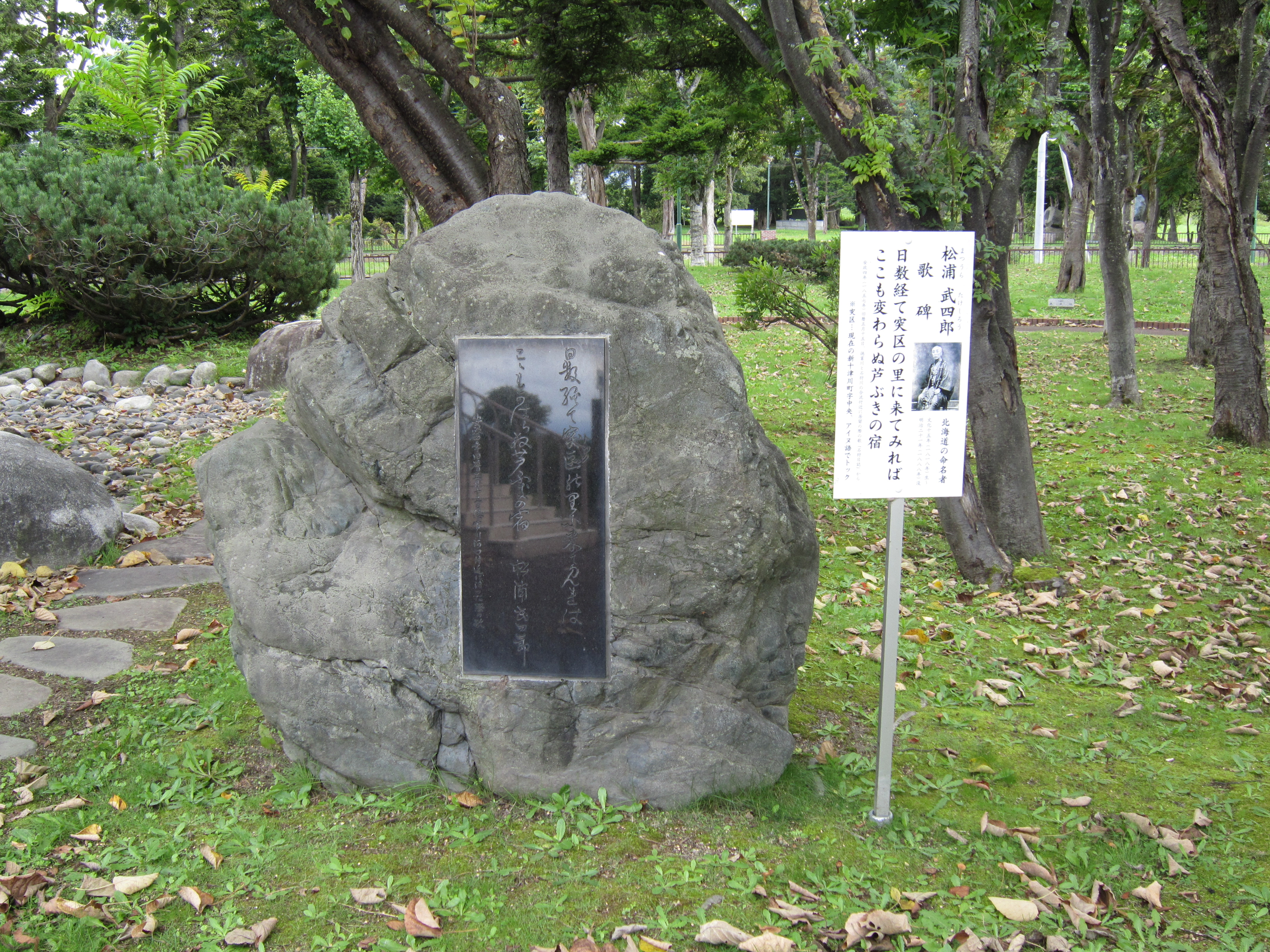 松浦武四郎 歌碑。新十津川町中央公園